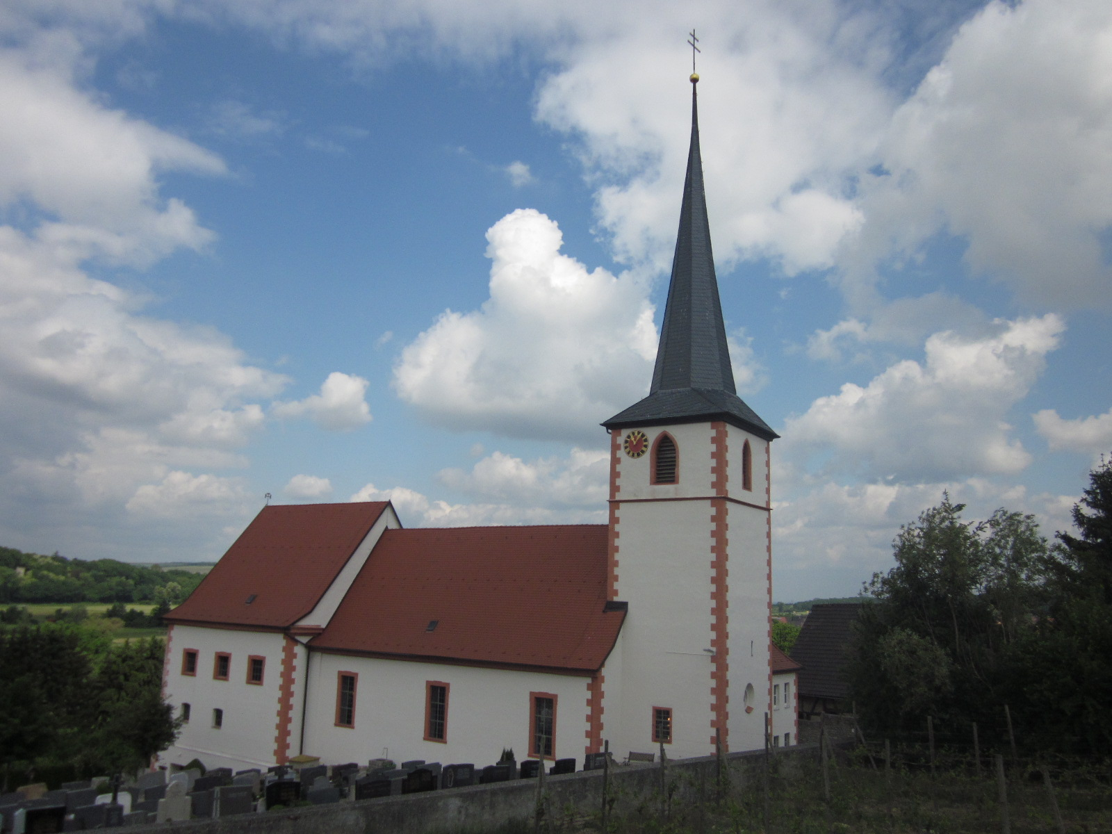 Die Kirche von Stammheim.